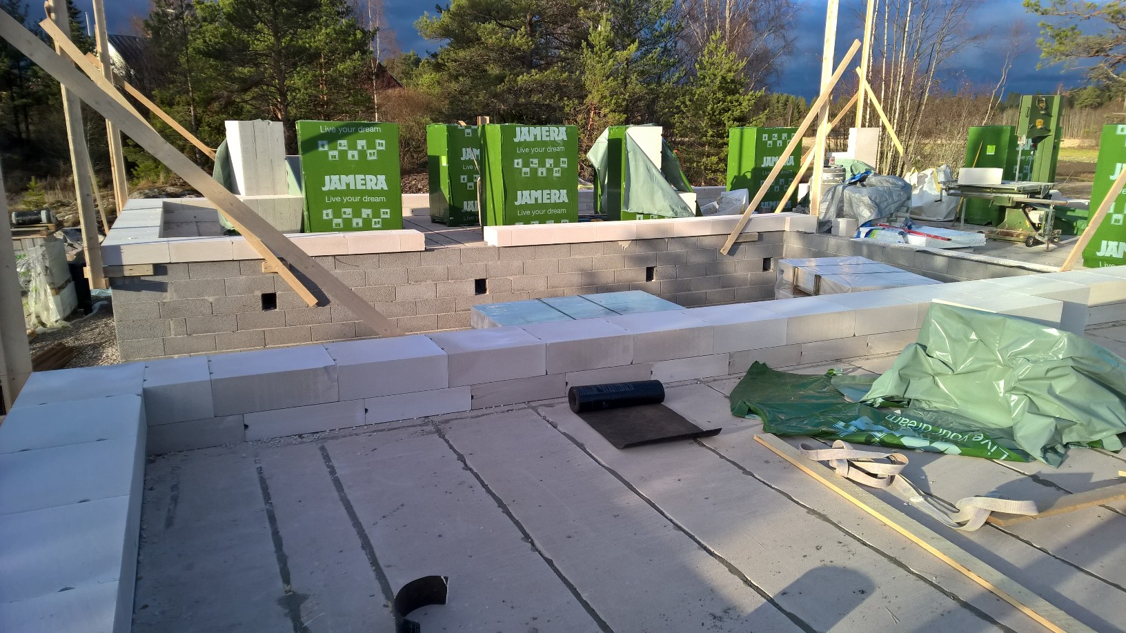 Kaikki pientalon tasot onnistuvat kevytbetonista